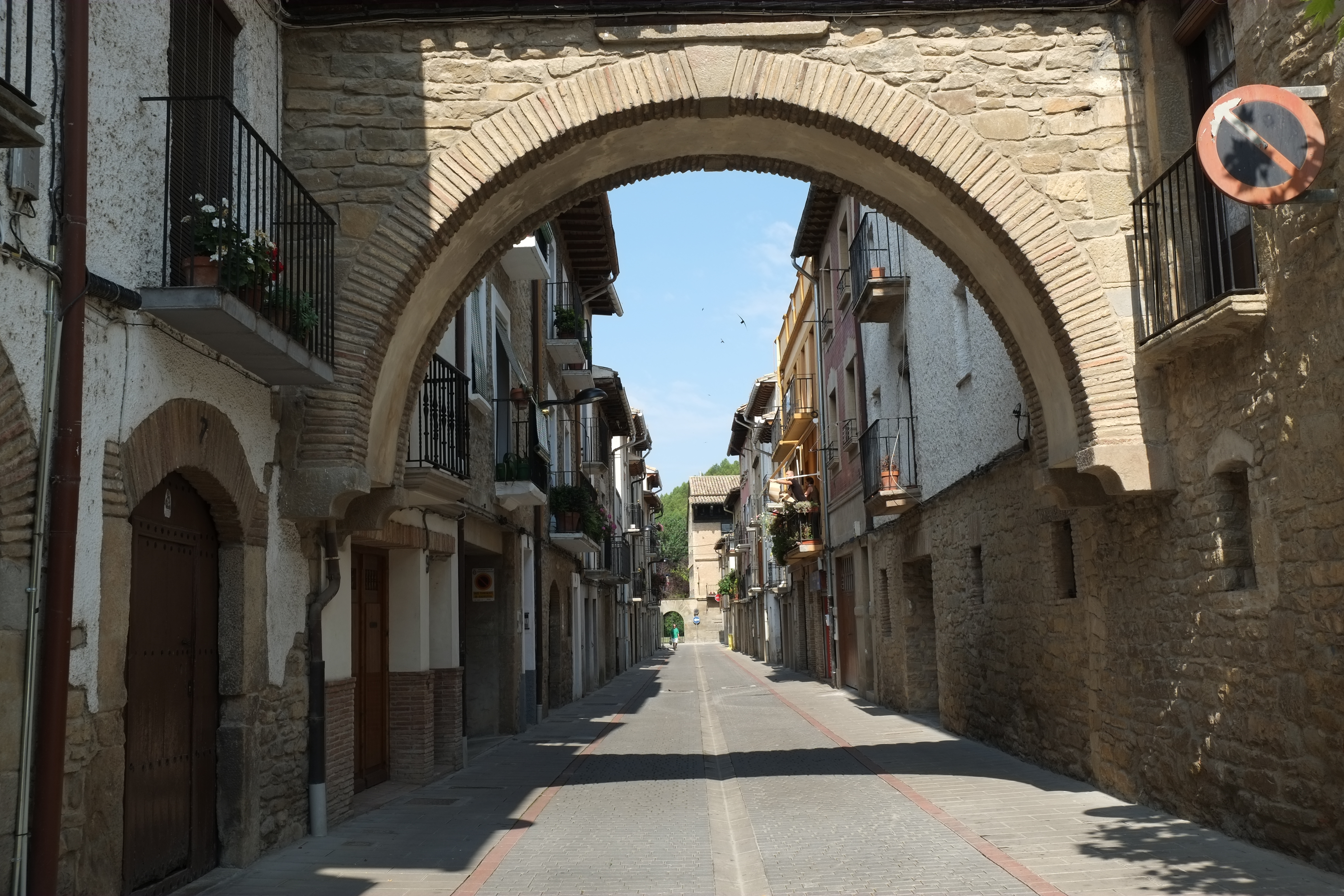 Sangüesa in Navarra (Spanien)